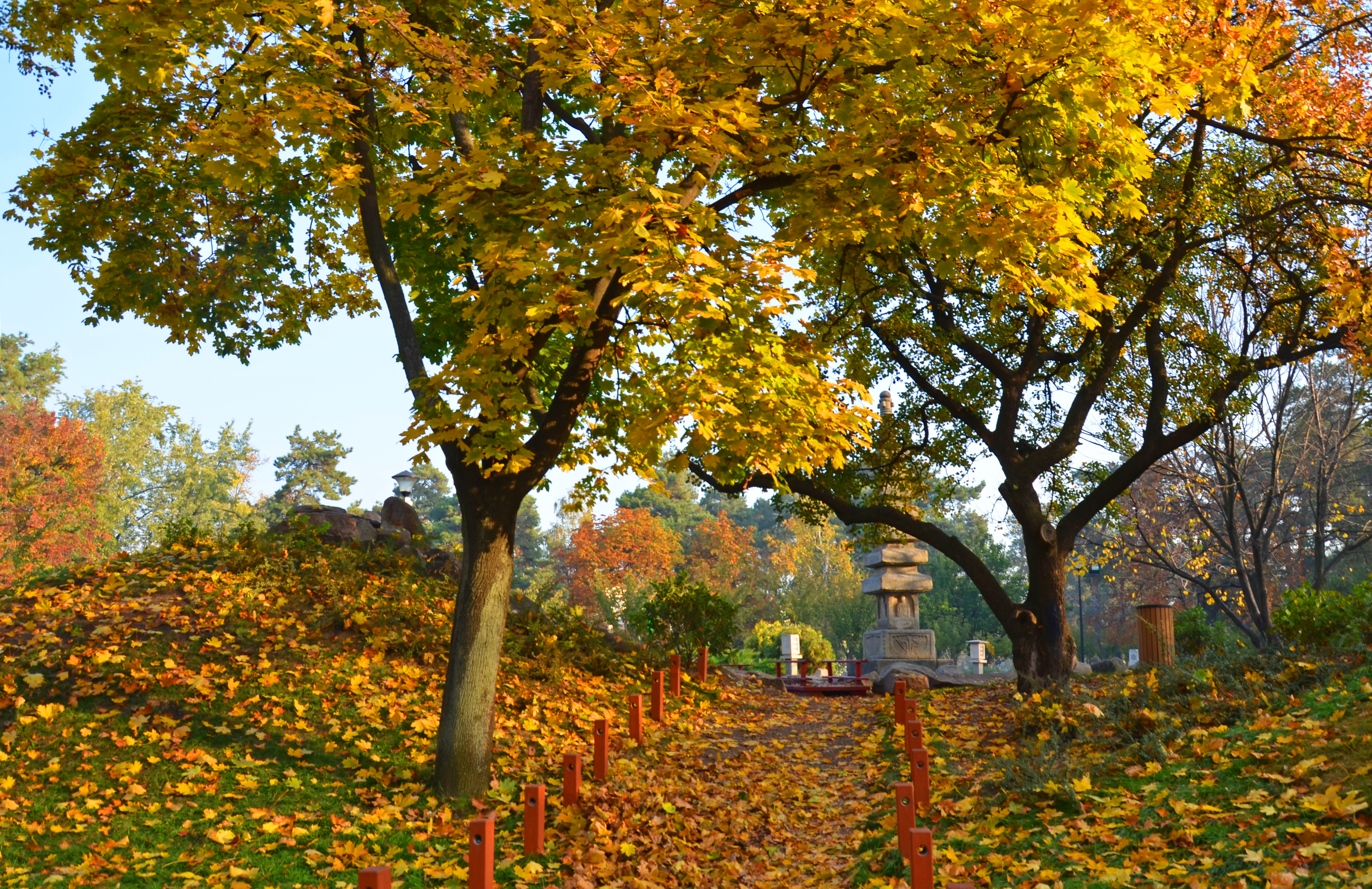 Парк «Кіото», Деснянський р-н, вздовж вулиці Кіото